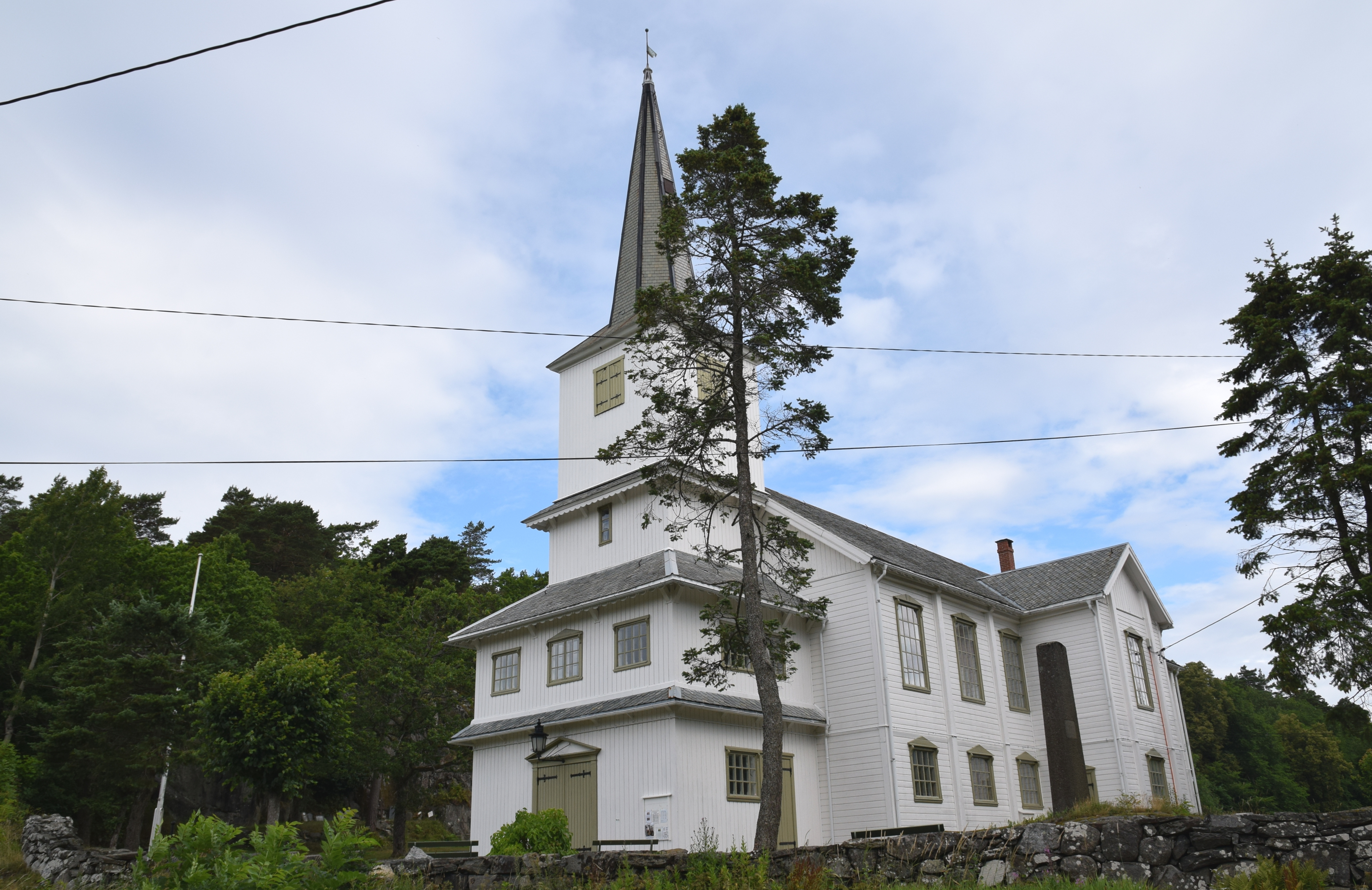 Skåtøy kirke, Kragerø kommune